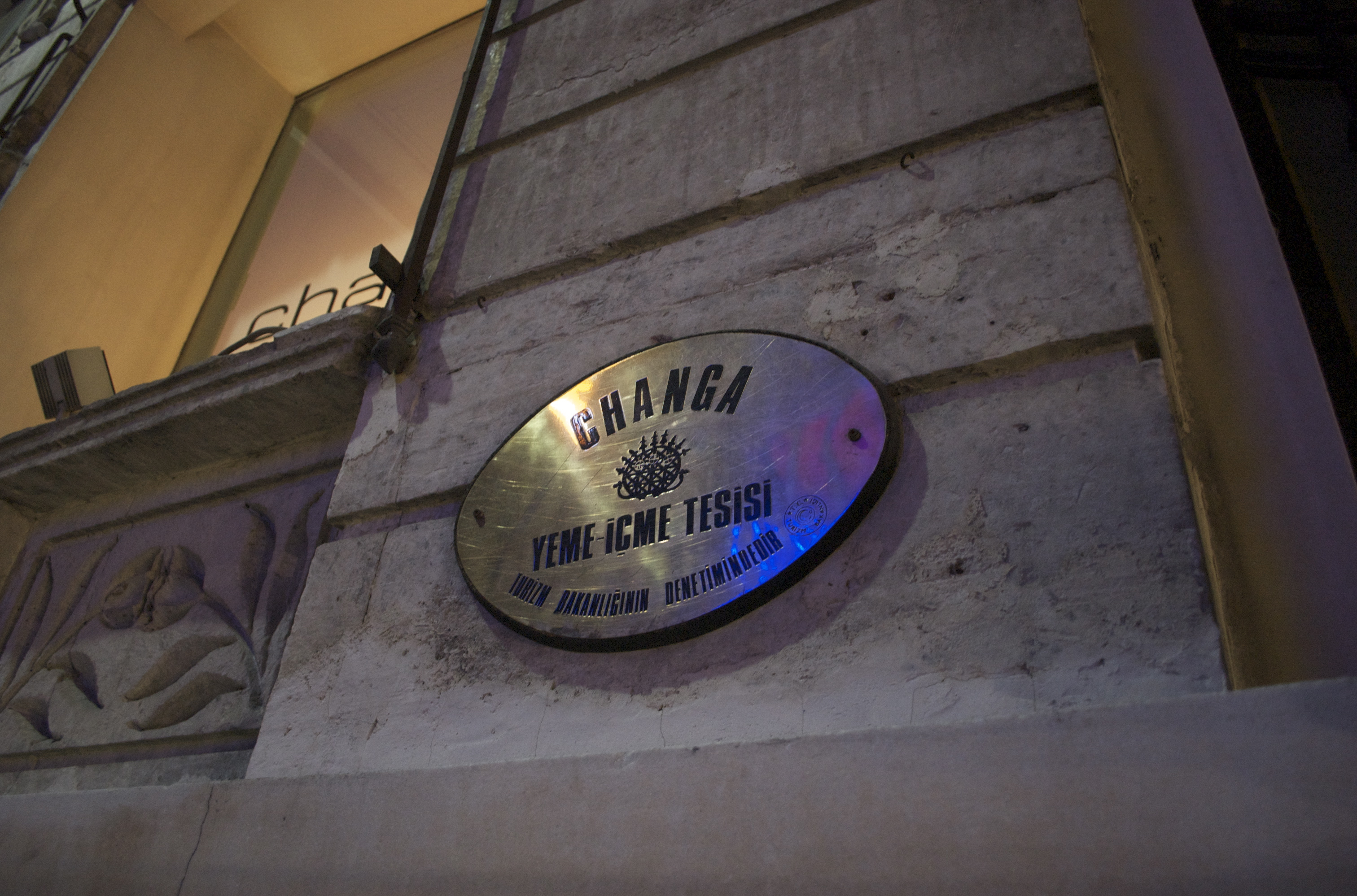 Changa, on Sıraselviler street